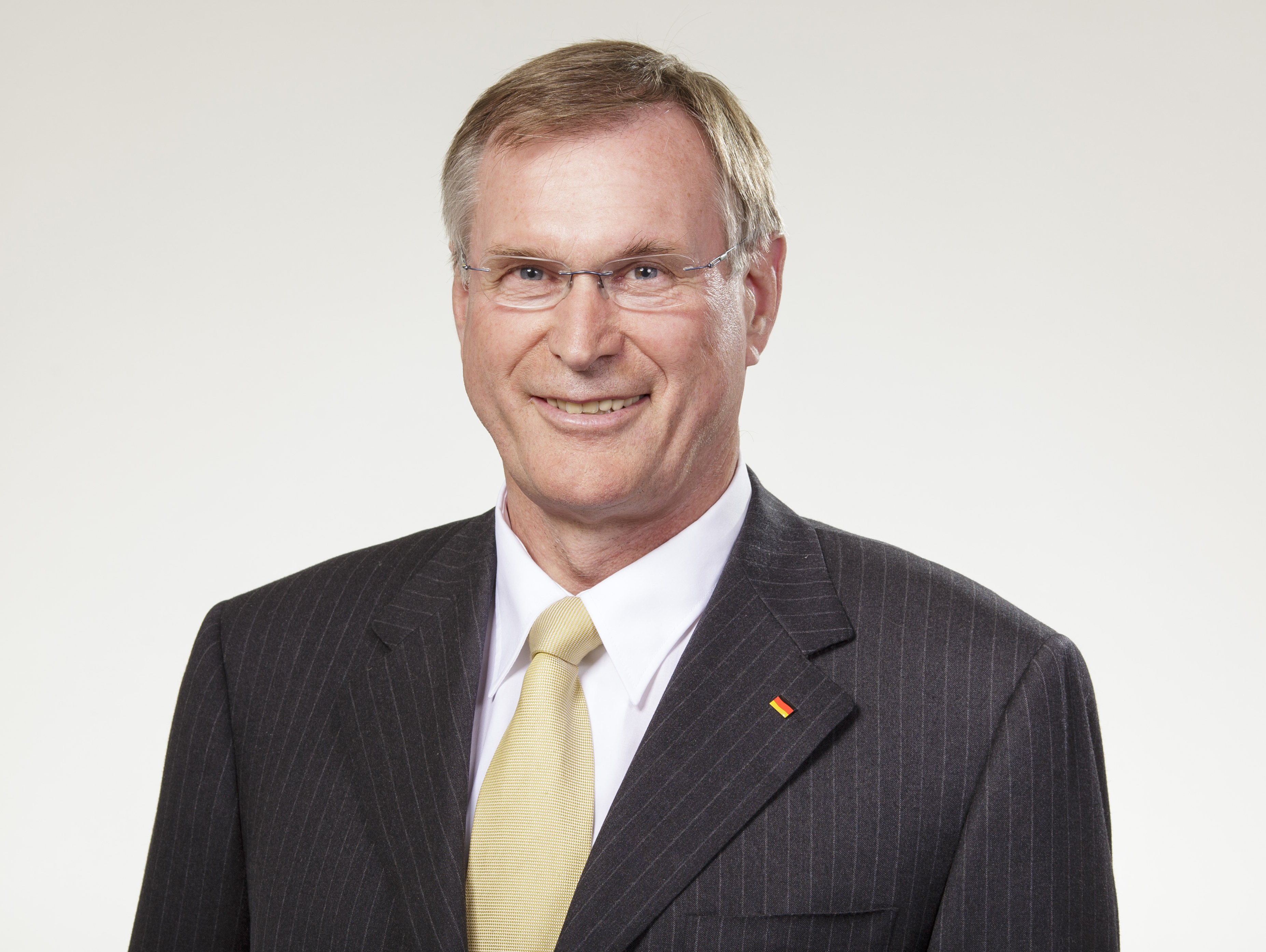 Johannes Singhammer, MdB (2012)